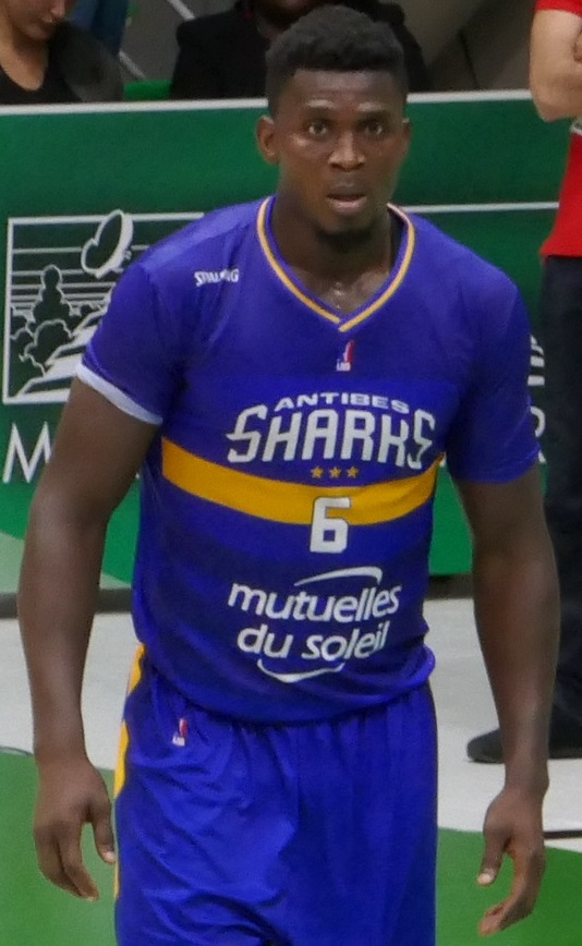 Mouphtaou Monra Yarou avec Antibes, en 2017.